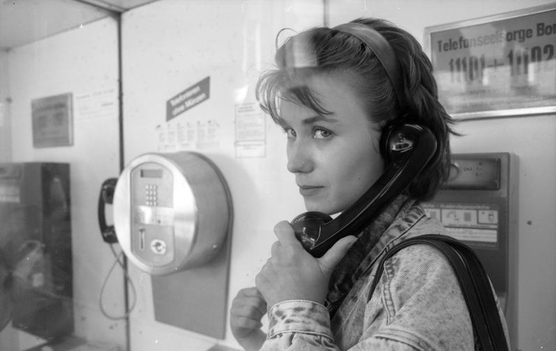 Juni 1988 Bonn, Innenstadt, Kaufhof